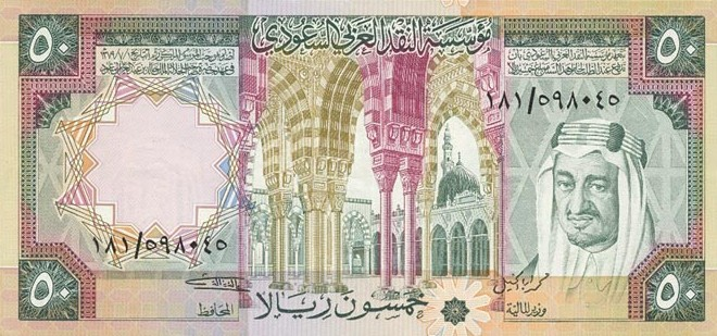 50 риалов. Саудовская Аравия, обр. 1976. Аверс.